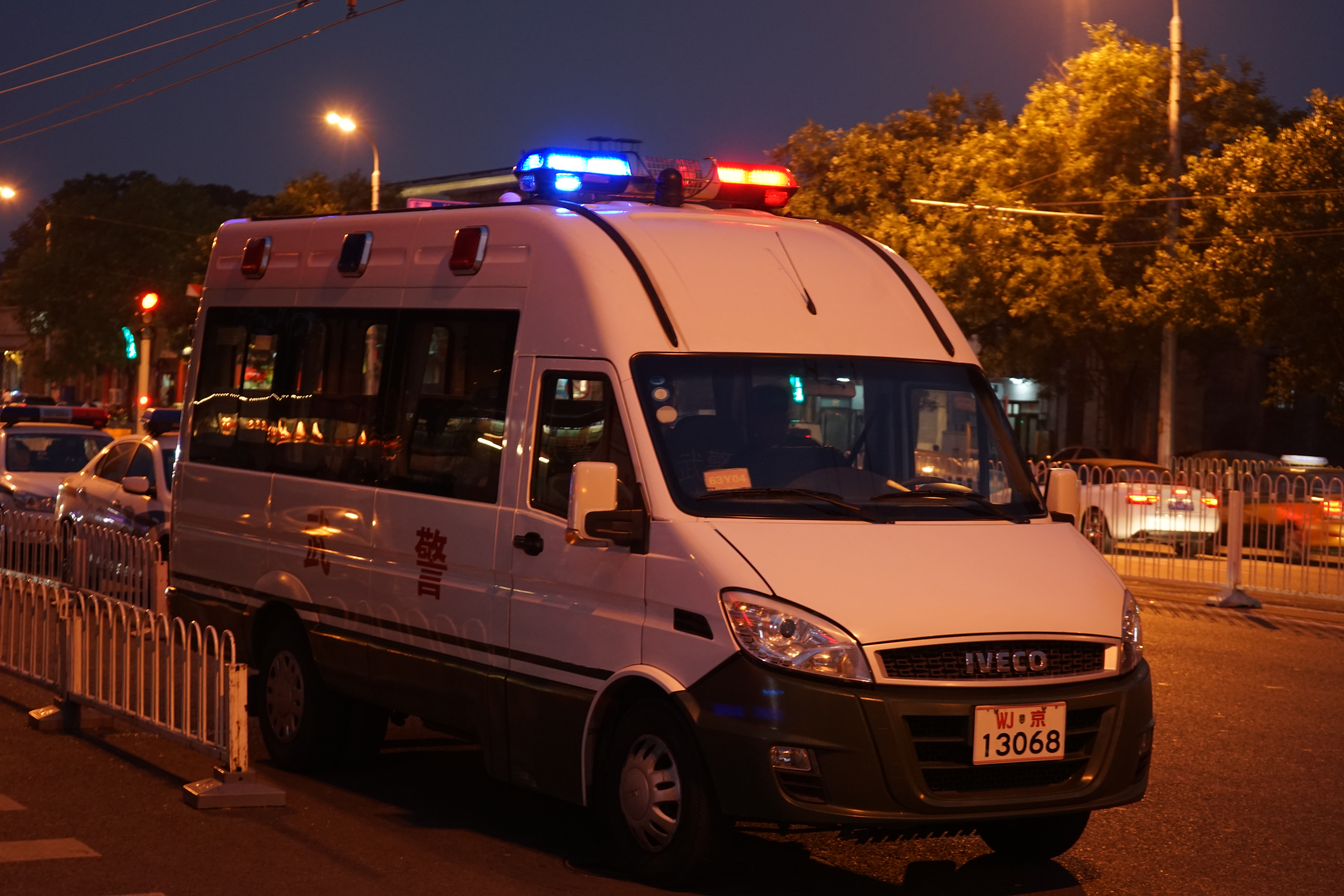 拍摄地点：中国北京市 单位：武警北京市总队 车牌号：WJ京13068